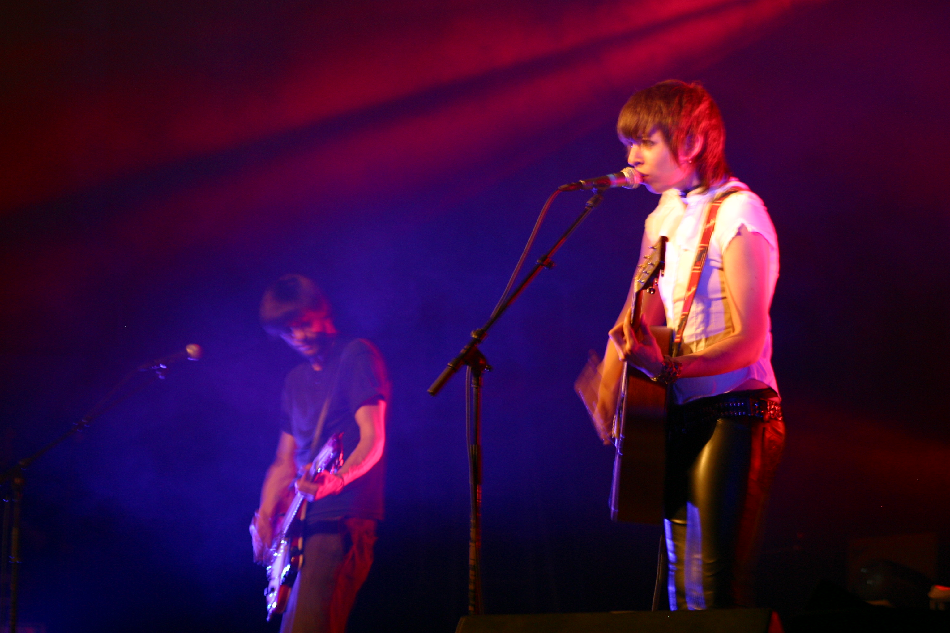 Mademoiselle K en concert à Saint-Brieuc